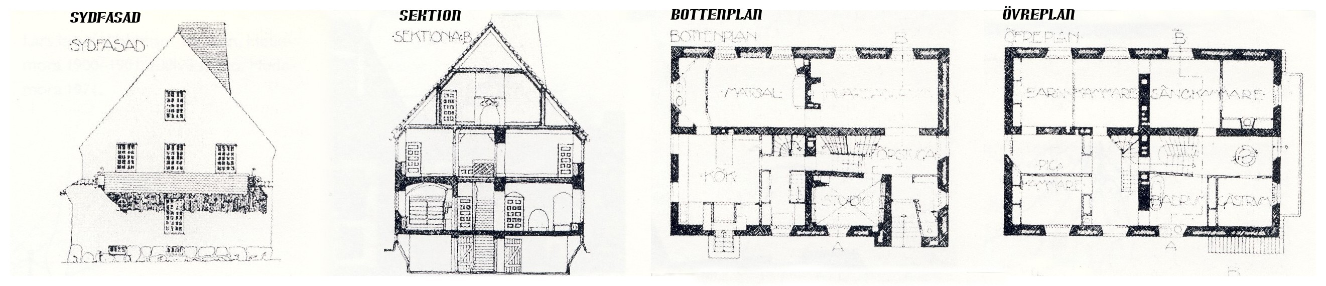 "Villa Lagercrantz" i Djursholm, Danderyds kommun, ritningar